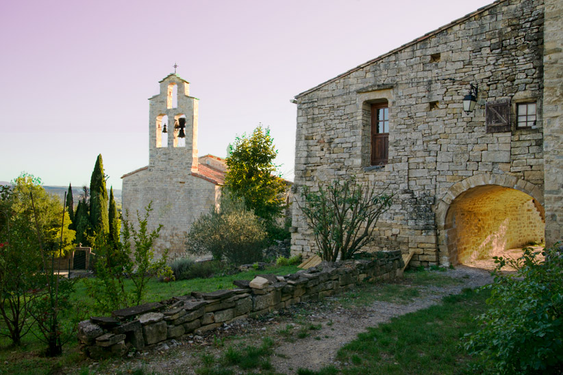 Église Saint-Gérard de Mas-de-Londres (Hérault, France) .